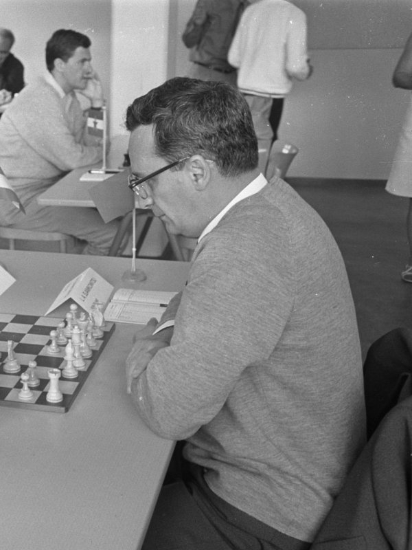 IBM-schaaktoernooi 1968, Russische grootmeester L. Sjamkowitsj.